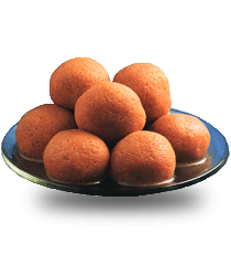 Bikalanda Kar's Famous Salepur Rasagola (Large)